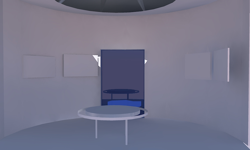 Template:Screenshotcopyrighted